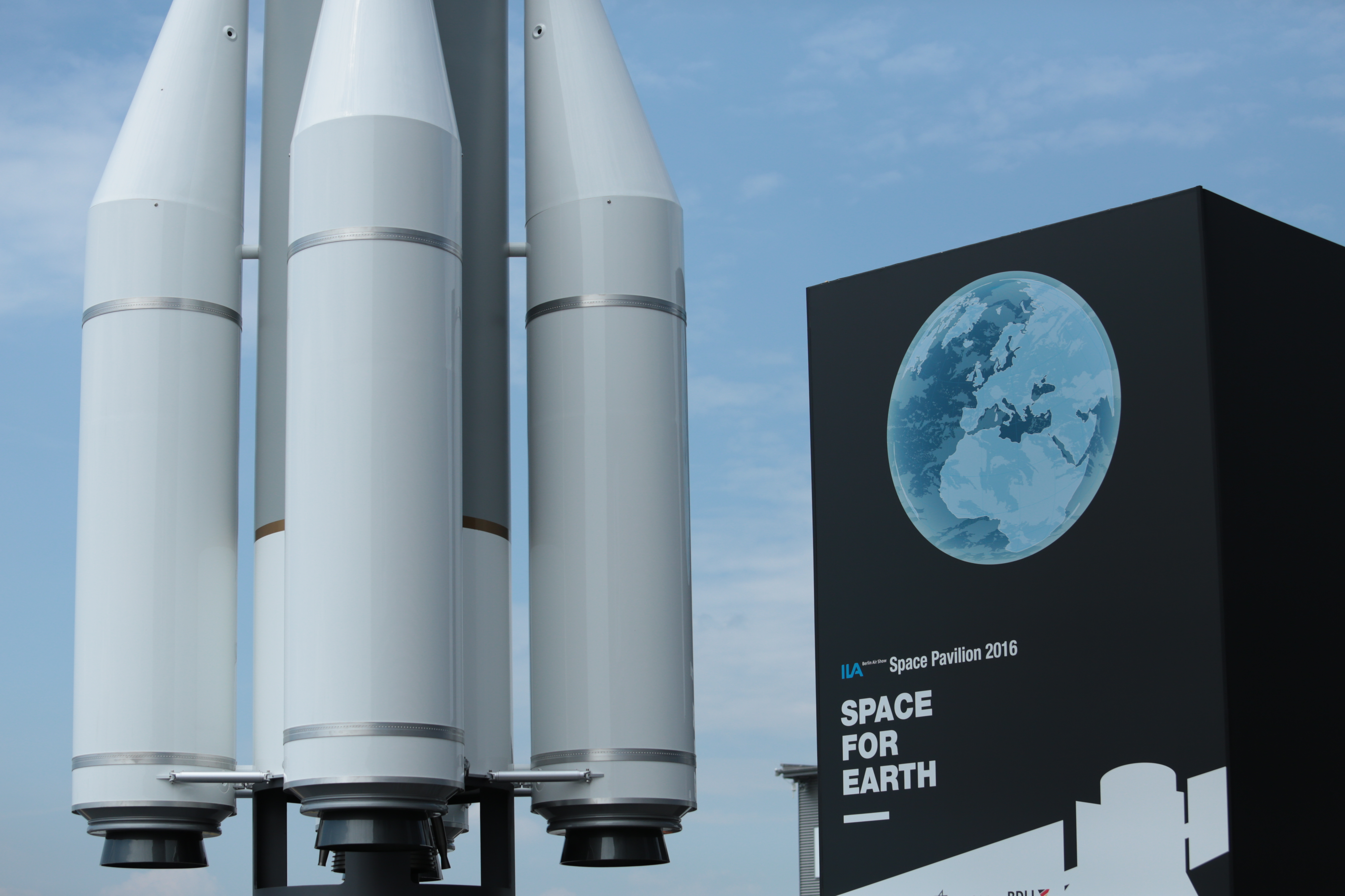 Die Internationale Luft- und Raumfahrtausstellung ILA (1. bis 4. Juni 2016) im Berlin ExpoCenter Airport in Schönefeld ist Marktplatz für die globale Luft- und Raumfahrt-Industrie. Das DLR beteiligt sich mit einem Ausstellungsstand, an dem seine aktuellen Highlight-Themen aus den Bereichen Luftfahrt, Energie, Verkehr und Sicherheit vertreten sind. Seine Raumfahrt-Aktivitäten zeigt das DLR im benachbarten Space Pavilion. Zudem ist das DLR mit eigenem Fluggerät und mit Personalmarketing-Experten vertreten. Credit: DLR (CC-BY 3.0)